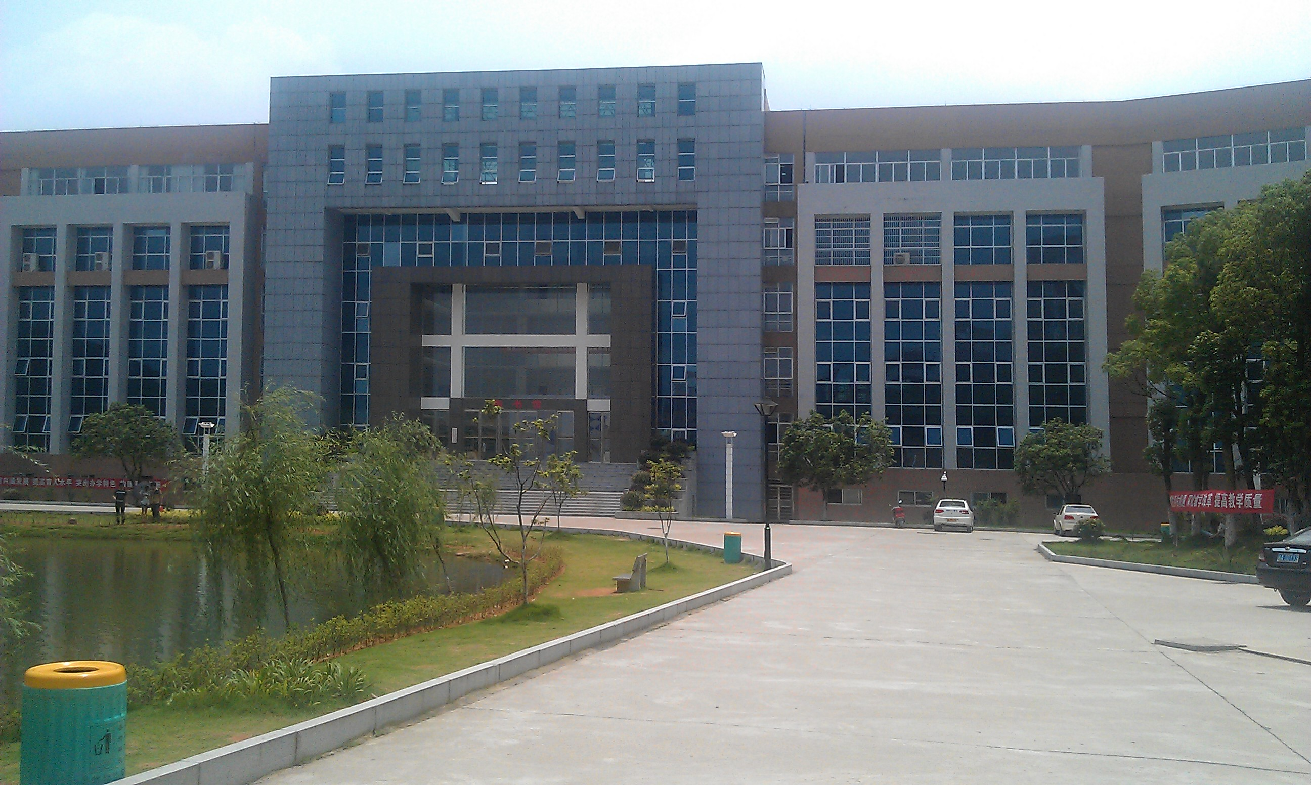 中南林业科技大学望城区校区图书馆的远景。